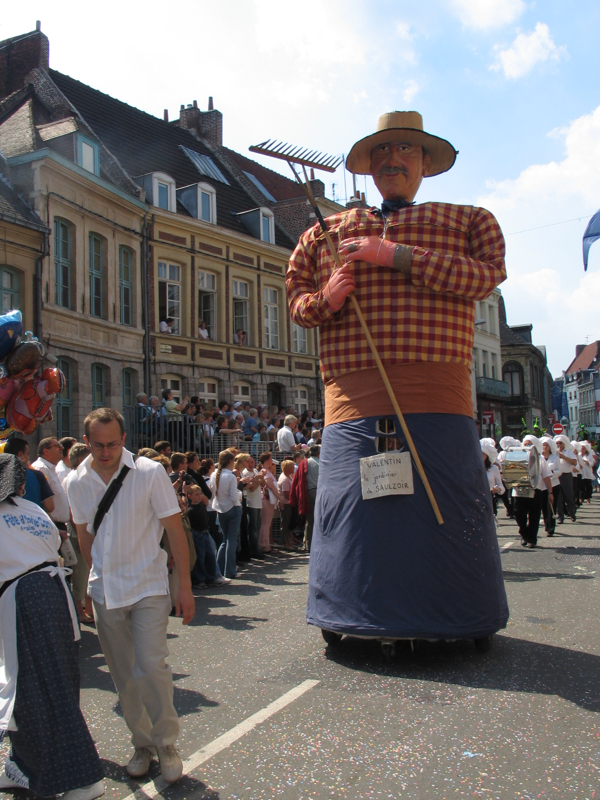 Reus tijdens reuzenstoet in Dowaai - eigen foto